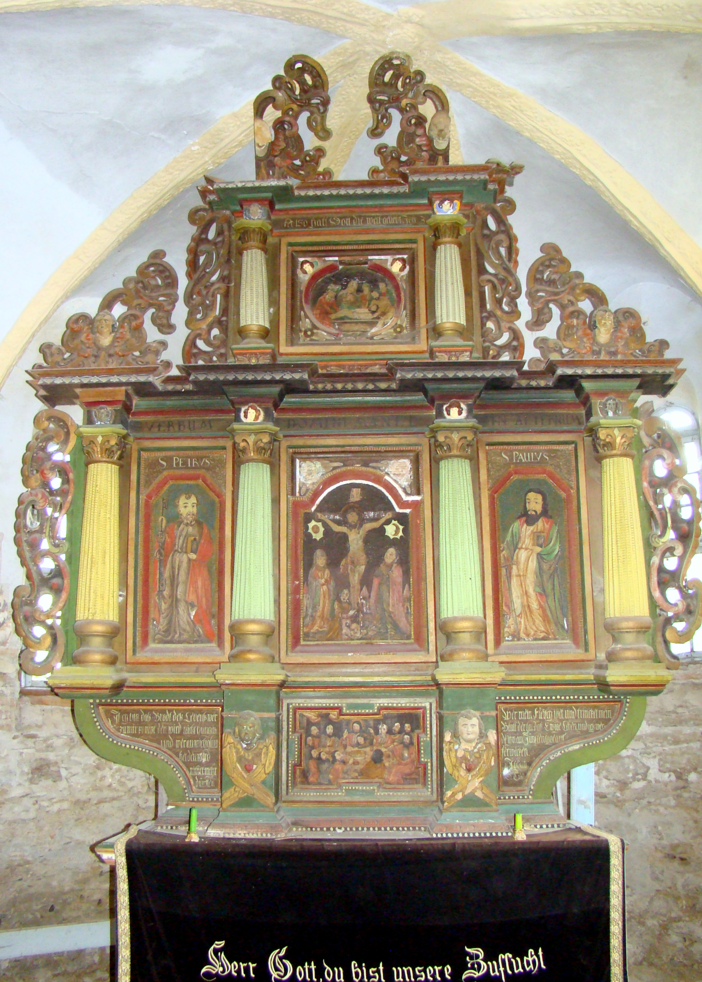 Altarul bisericii evanghelice din satul Ormeniş 01